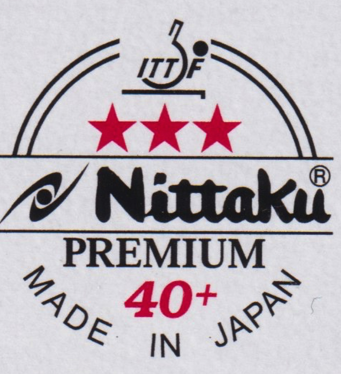 Aufdruck auf einem Tischtennisball "40+" aus Plastik (≠ Celluloid)